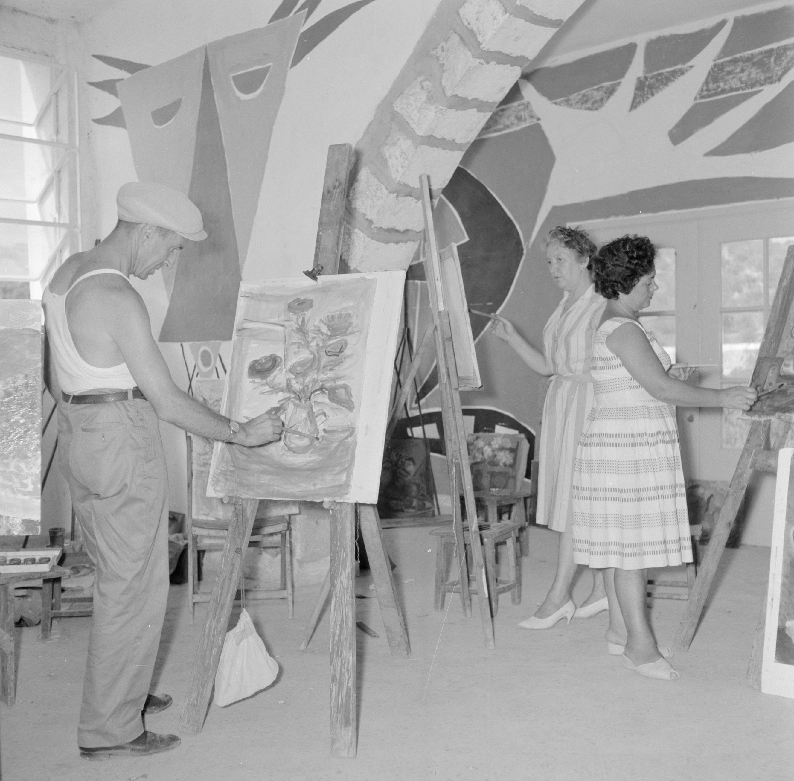 Collectie / Archief : Fotocollectie Van de Poll Reportage / Serie : Israël 1964-1965. Ein Hod Beschrijving : Schildersklas aan het werk in een atelier in het kunstenaarsdorp Ein Hod Annotatie : Ein Hod is een kunstenaarskolonie ten zuiden van de berg Carmel. Opgericht door de Dada-kunstenaar Marcel Janco. Datum : 1964 Locatie : Ein Hod, Israël Trefwoorden : kunstenaarskolonies, schilderijen, schildersklassen Fotograaf : Poll, Willem van de, [onbekend] Auteursrechthebbende : Nationaal Archief Materiaalsoort : Negatief (zwart/wit) Nummer archiefinventaris : bekijk toegang 2.24.14.02 Bestanddeelnummer : 255-2764